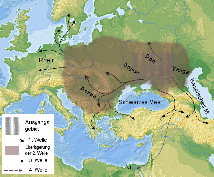 Kurgan kultur